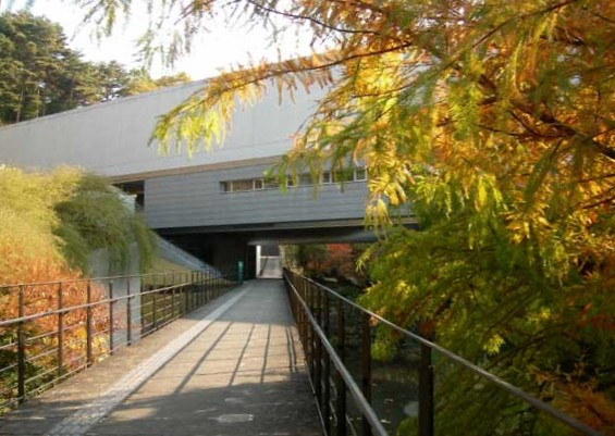 Sendai Bungakukan, Sendai-city, Miyagi-prefecture, Japan. 仙台文学館（宮城県仙台市）。